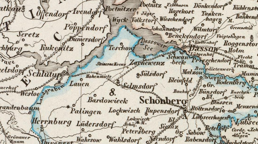 Kartenauschnitt: Hohemeile bei Schoenberg. Aus: Special Karte von den Grossherzogthumern Mecklenburg-Schwerin und Mecklenburg-Strelitz , entworfen u. gezeichnet von C.F. Weiland. (with) Schwerin nebst Umgebungen. Weimar, im Verlage des geogr: Instituts, 1856. Gestochen von Carl Jungmann. Verzeichnet sind das Forstamt des Forstes Hohemeile sowie als „Steinernes Kreuz“ der Standort der Mordwange Sülsdorf am Weg nach Teschow.